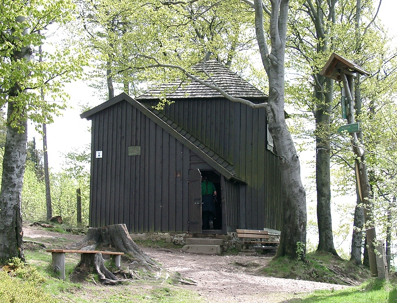 Das Bild zeigt das Goethehäuschen auf dem Kickelhahn bei Ilmenau